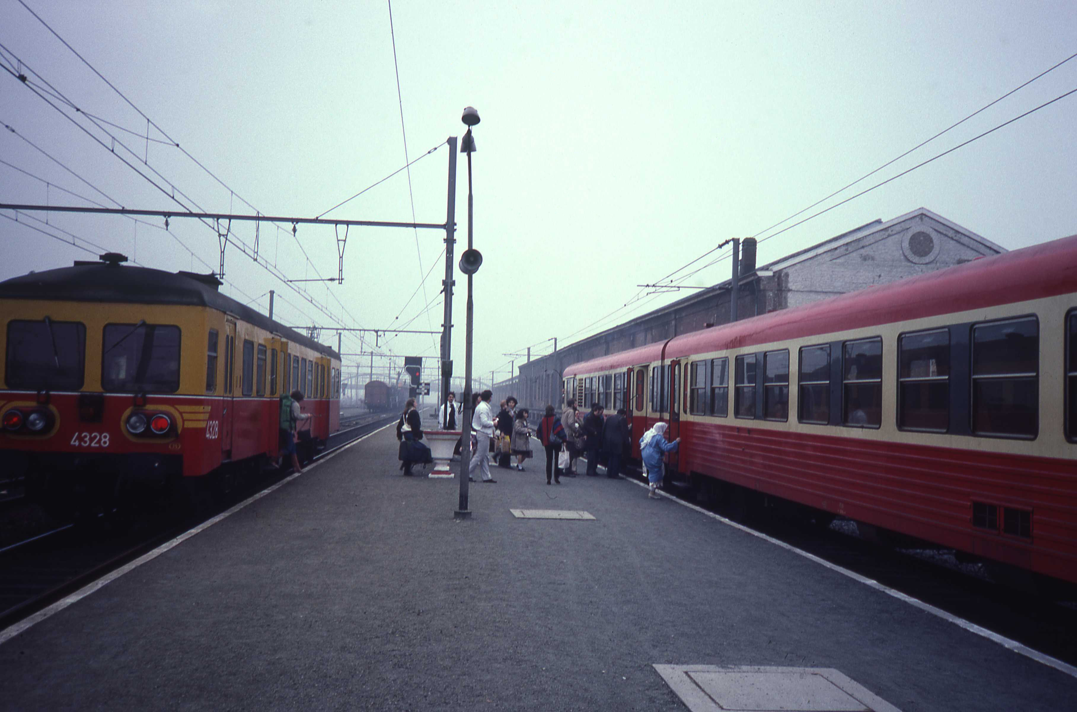 Een overstap in Moescroen tussen twee autorails. De Franse train is op een kopspoor onder 25 kV wisselspanning die ondertussen niet meer bestaat.